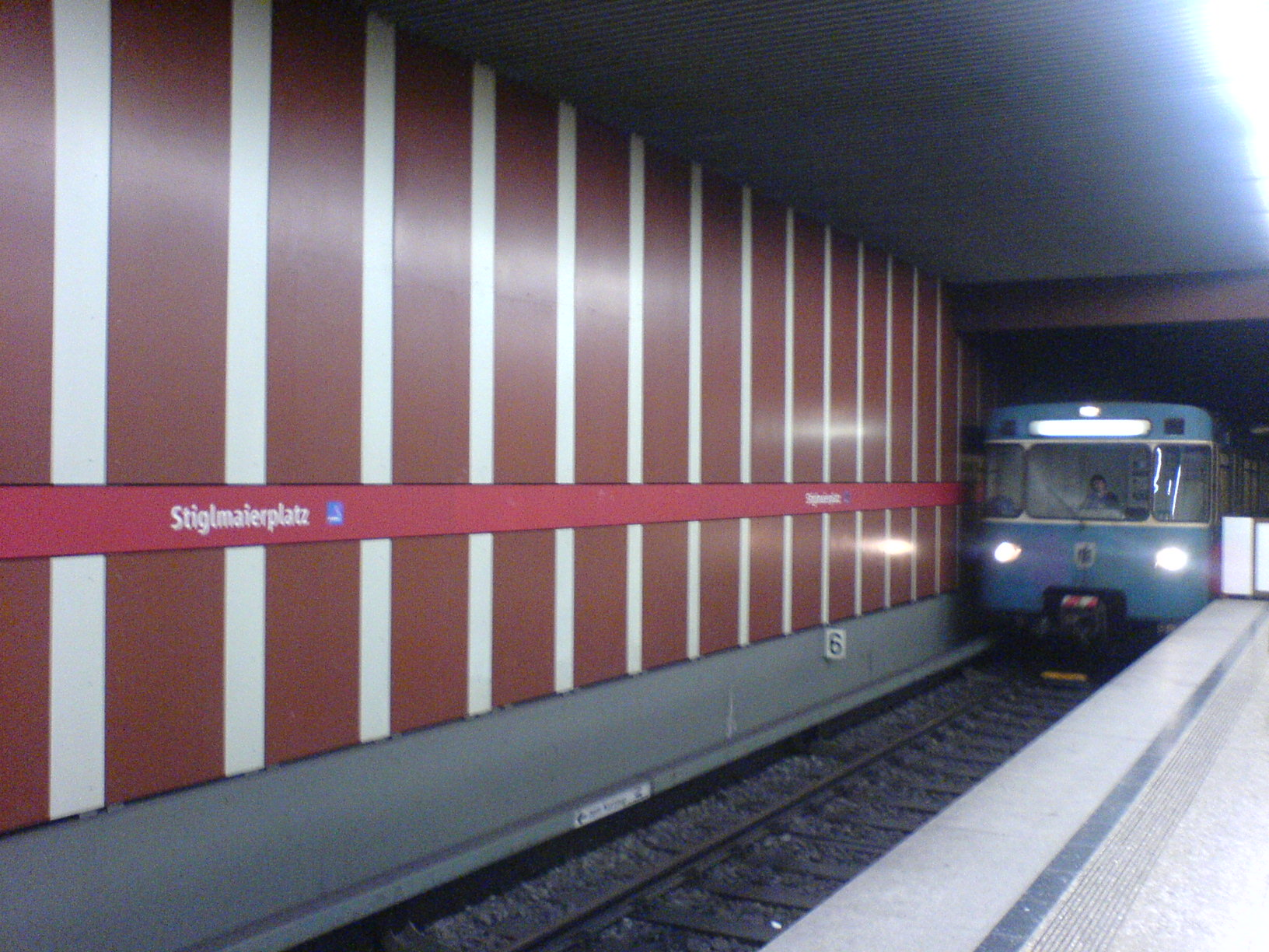 U-Bahnhof Stiglmaierplatz (München), Bahnsteig mit ankommendem Zug in Richtung Mangfallplatz